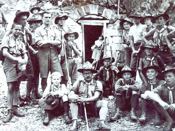 Puskás Lajos a cserkészeivel a torjai Büdösbarlang bejáratánál